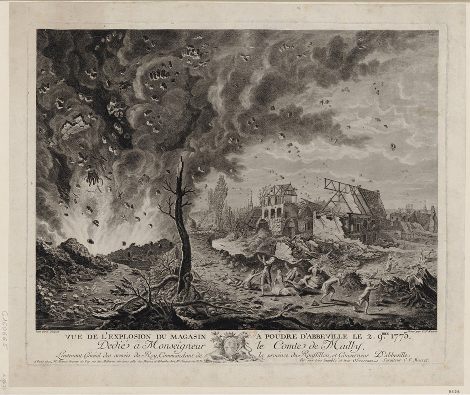 gravure